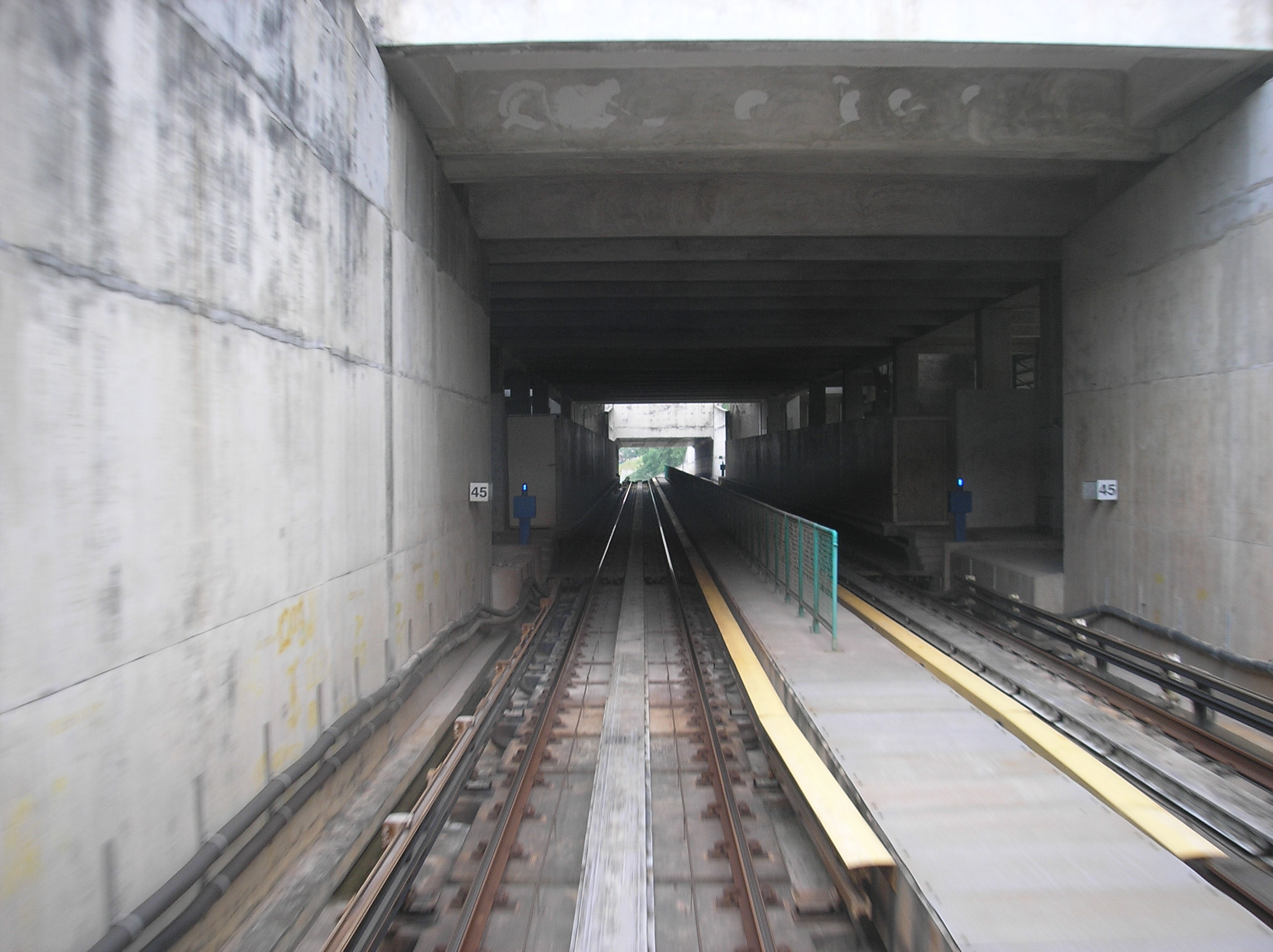 The Sri Rampai LRT station (Kelana Jaya Line), Kuala Lumpur, Malaysia.